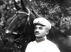 Мелькумов Я. А.